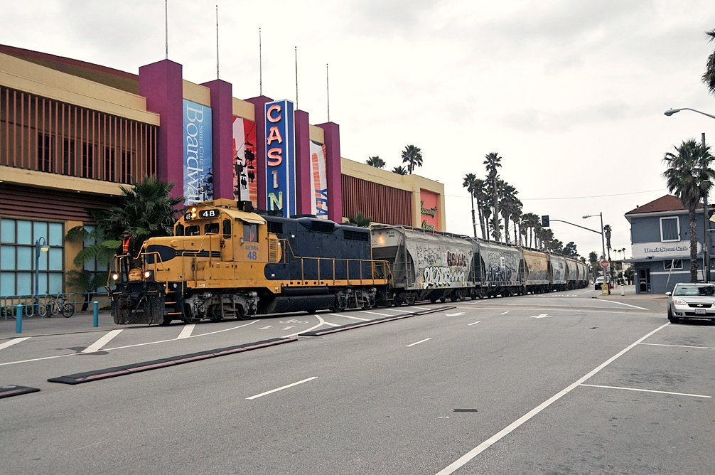 March 9 2010 Santa Cruz 051xRP